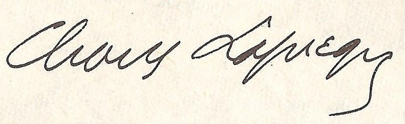 Signature du peintre français Charles Lapicque